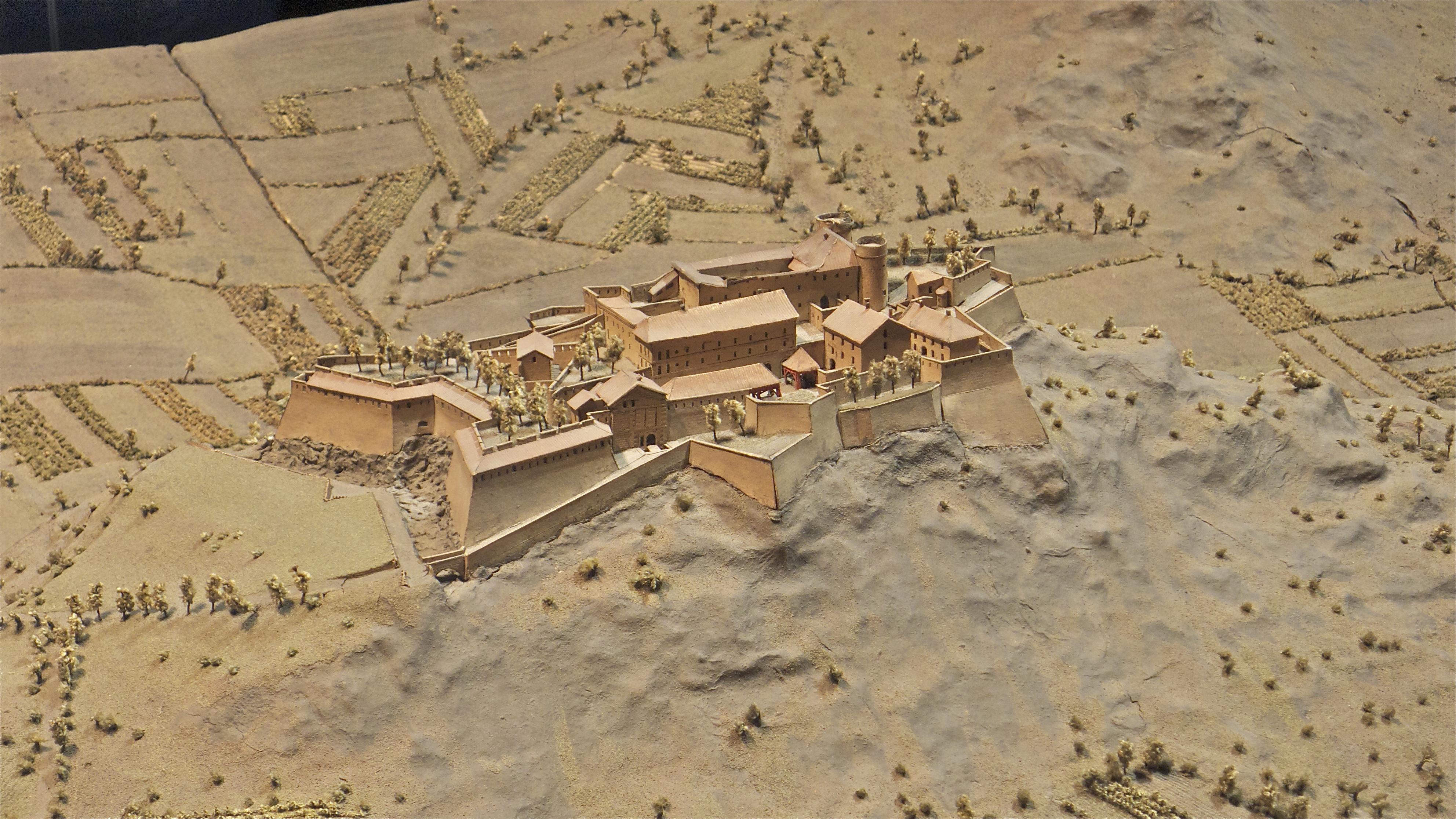 Plan-relief du fort d'Exilles dans son état de 1695. Plan-relief construit en 1695. Échelle 1/600e